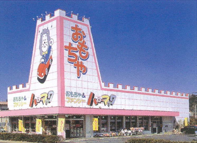 ハローマックの店舗外観写真